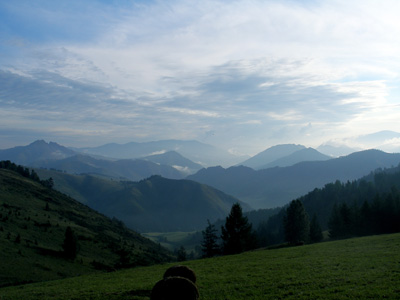 Mounts in Charysh Distrikt, Altai Krai